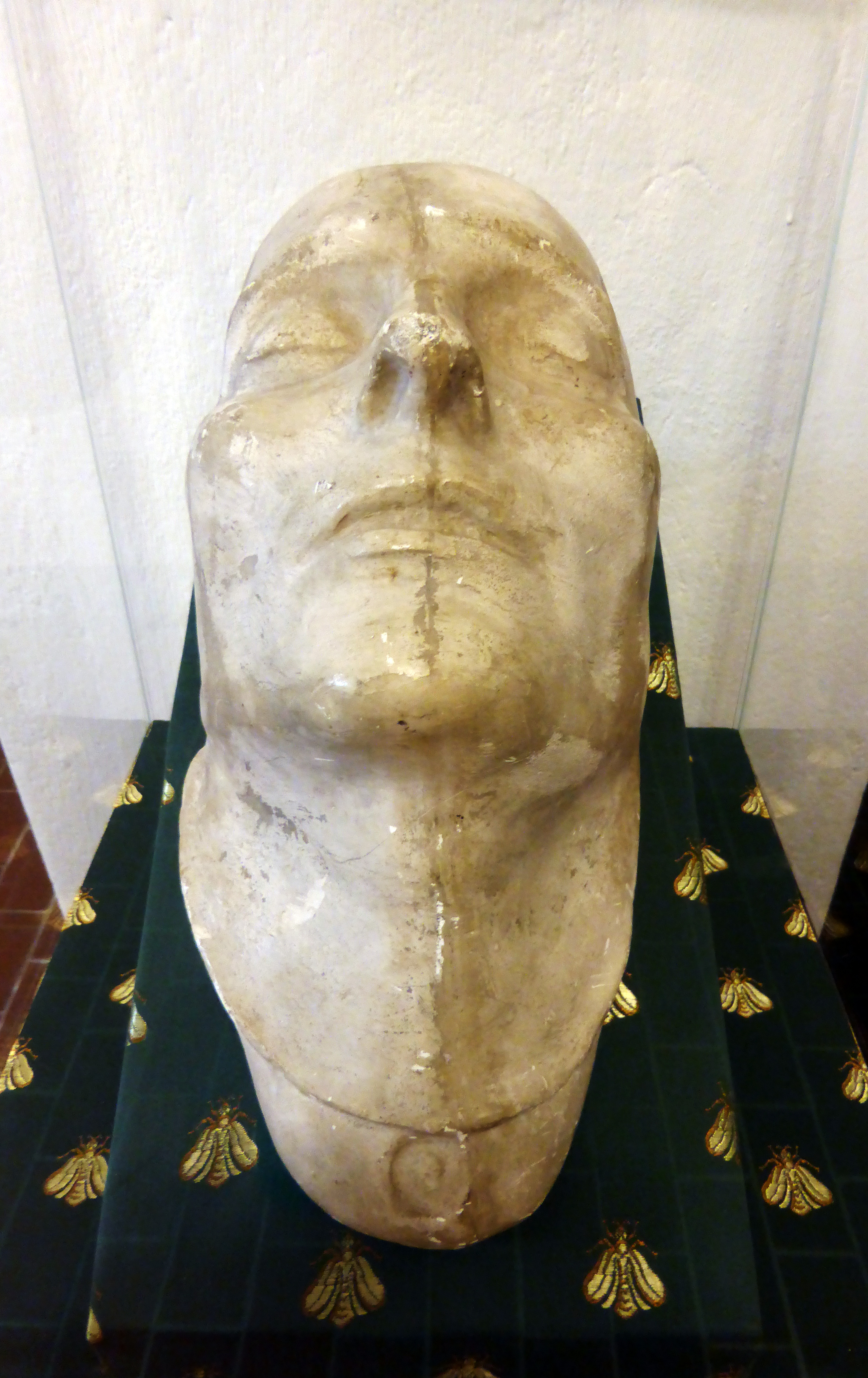 Totenmaske von Napoleon Bonaparte aus Gips. Gefertigt vom Leibarzt Francesco Antommarchi am 7. Mai 1821. Aus dem Besitz der Gräfin Auguste Charlotte von Kielmannsegge. Ausgestellt im Militärhistorischen Museum Wolkenstein, Schloßplatz 4, Wolkenstein.